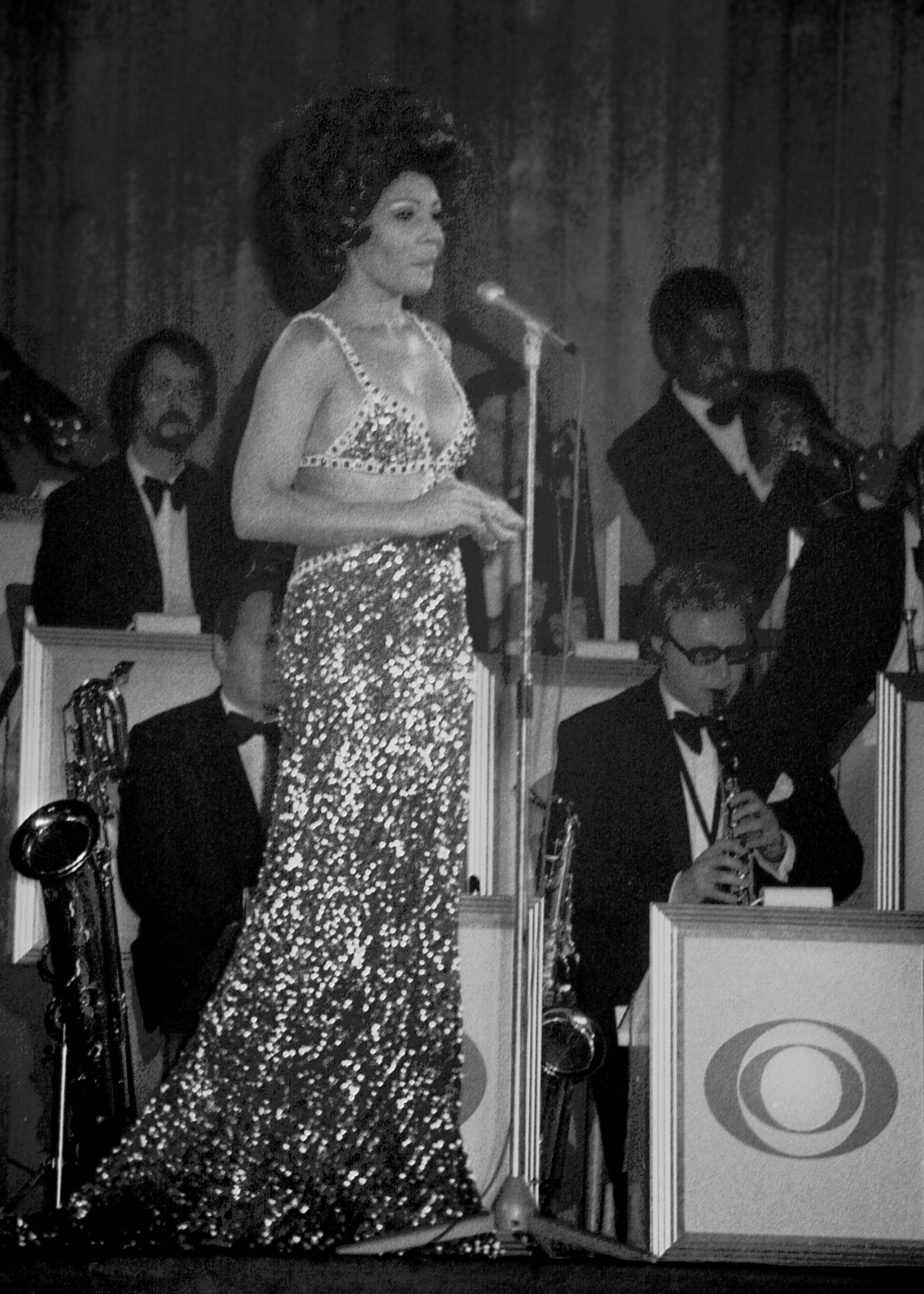 Concert de Shirley Bassey début des années 70 à la Muensterhalle de Munster en Allemagne ( Westphalie)